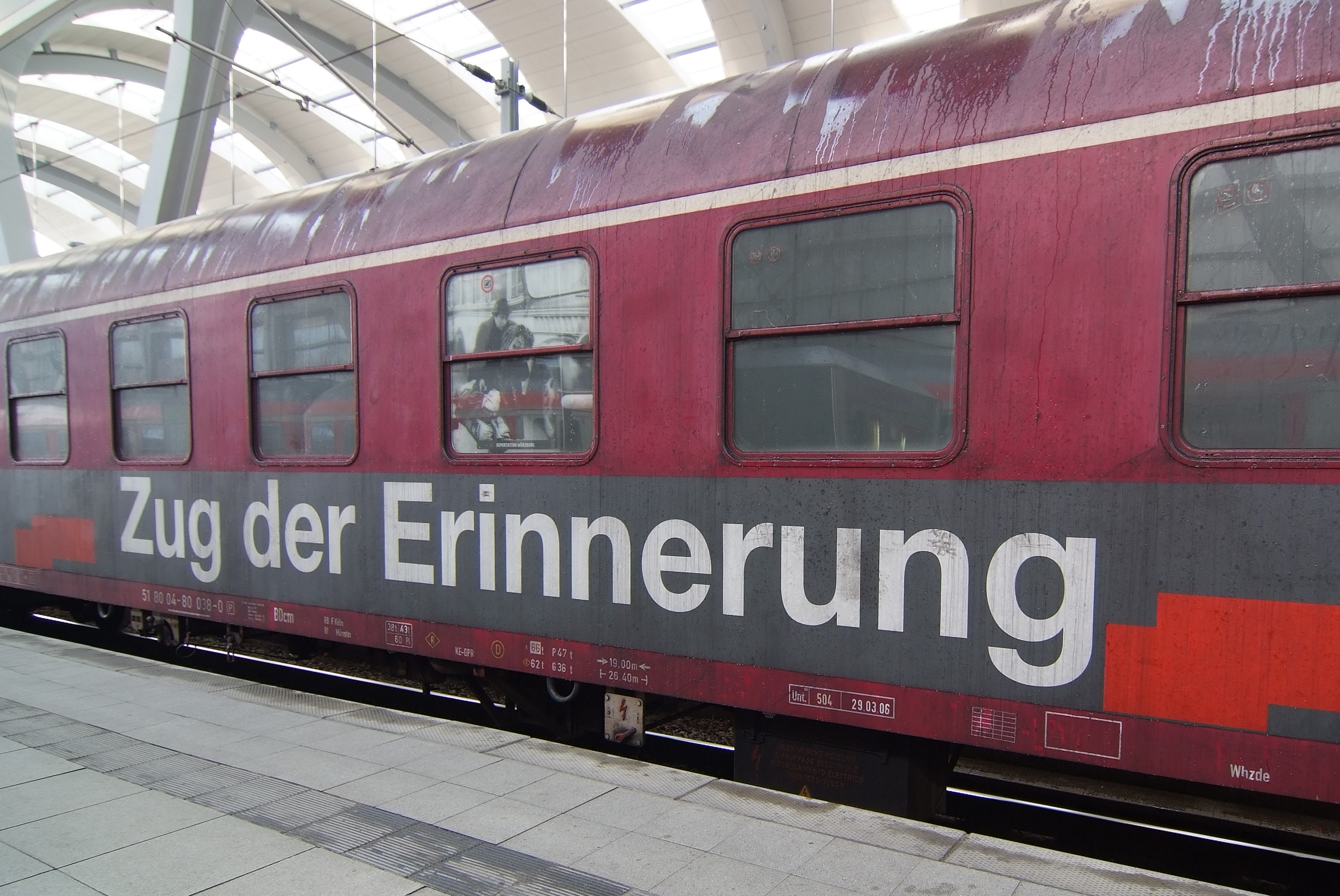 Zug der Erinnerung (Holocaust memorial train 2007/2008) in Kiel, 7-9 April 2008